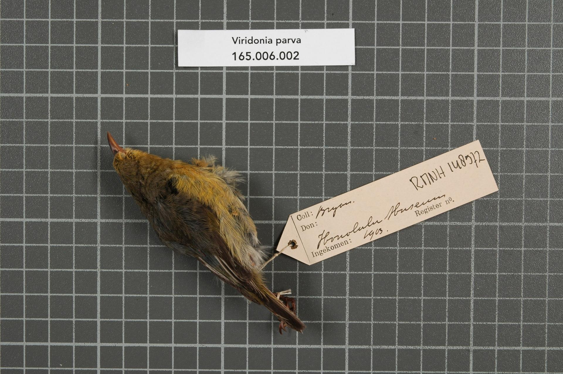 Viridonia parva (Stejneger, 1887)